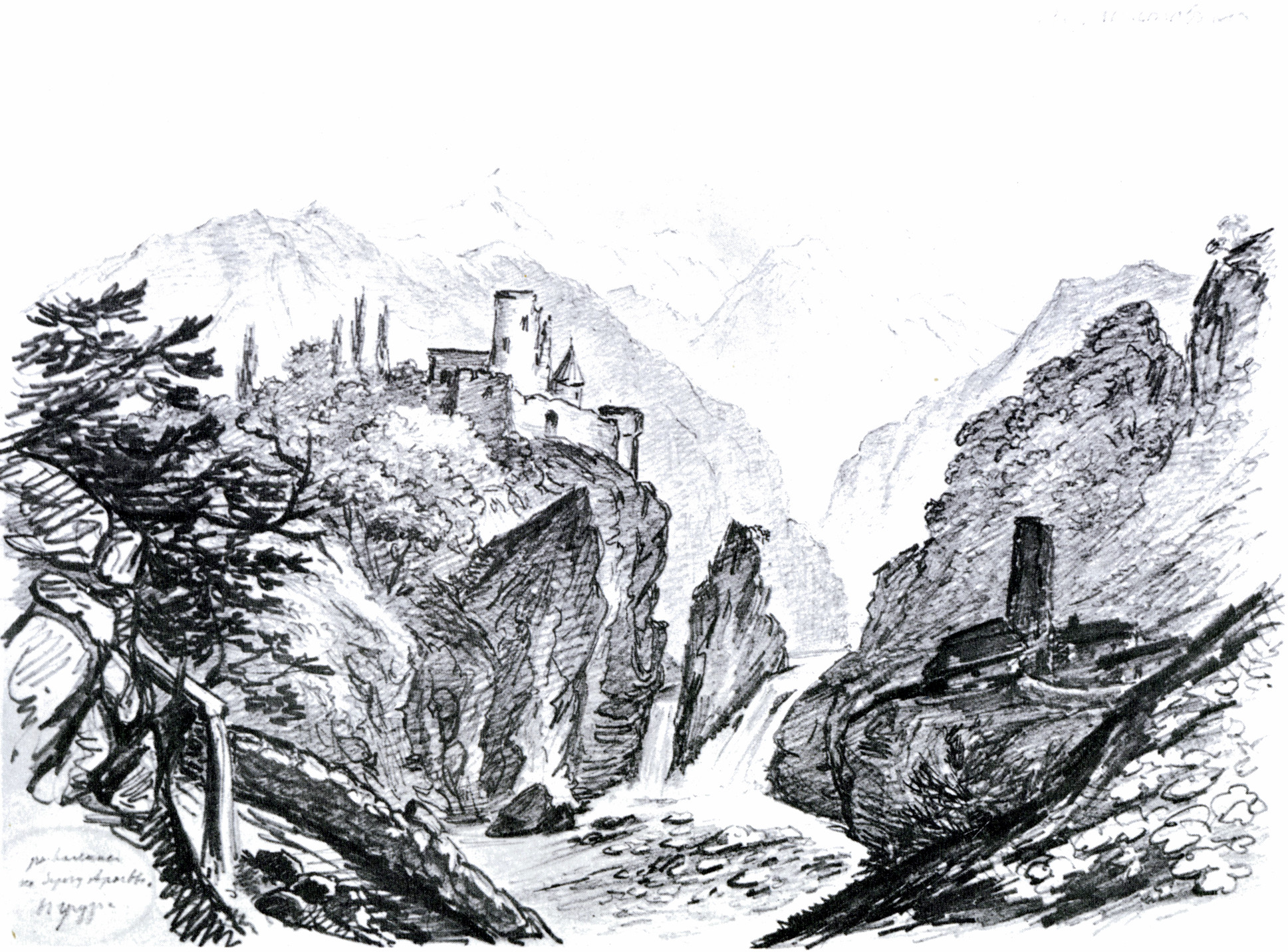 Ruderi sulle rive dell'Aragvi